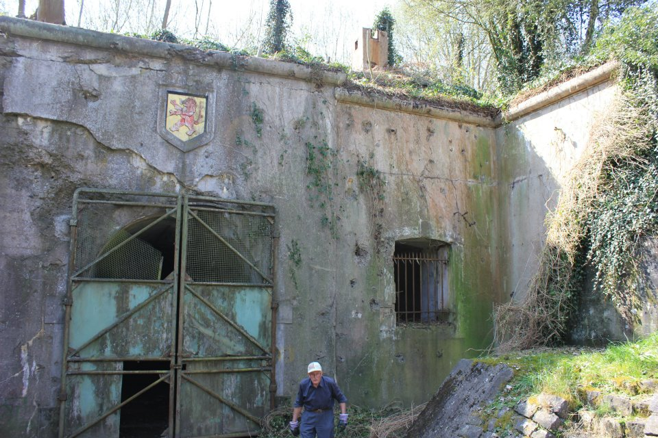 Fort de BOncelles